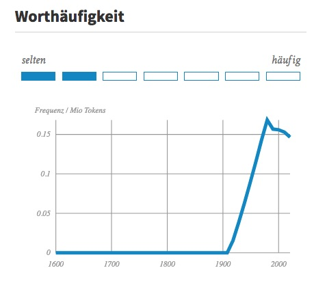 DWDS-Wortverlaufskurve für „Stilmöbel“, erstellt durch das Digitale Wörterbuch der deutschen Sprache, , abgerufen am 02.02.2018.